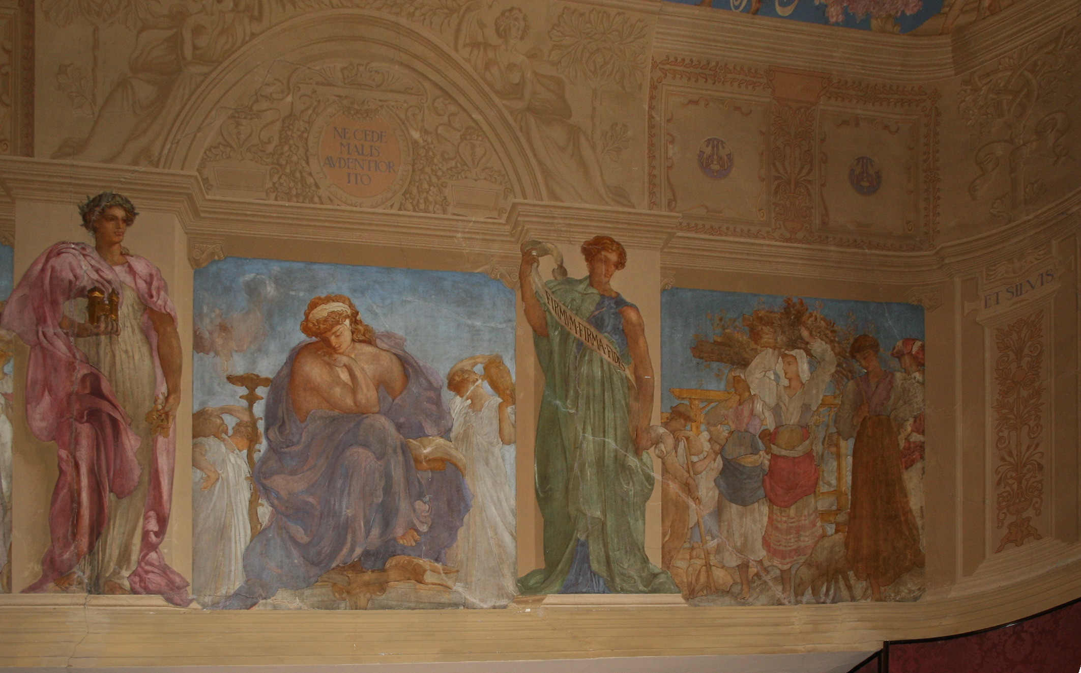 Sibilla Appenninica o Picena di Adolfo de Carolis - dipinto del salone di rappresentanza all'interno dell'alloggio prefettizio del Palazzo del Governo di Ascoli Piceno. Un sentito ringraziamento a S.E. il Prefetto di Ascoli Piceno Dott. Alberto Cifelli che, accordandomi il permesso di ingresso al salone, ha consentito lo scatto di questa immagine.